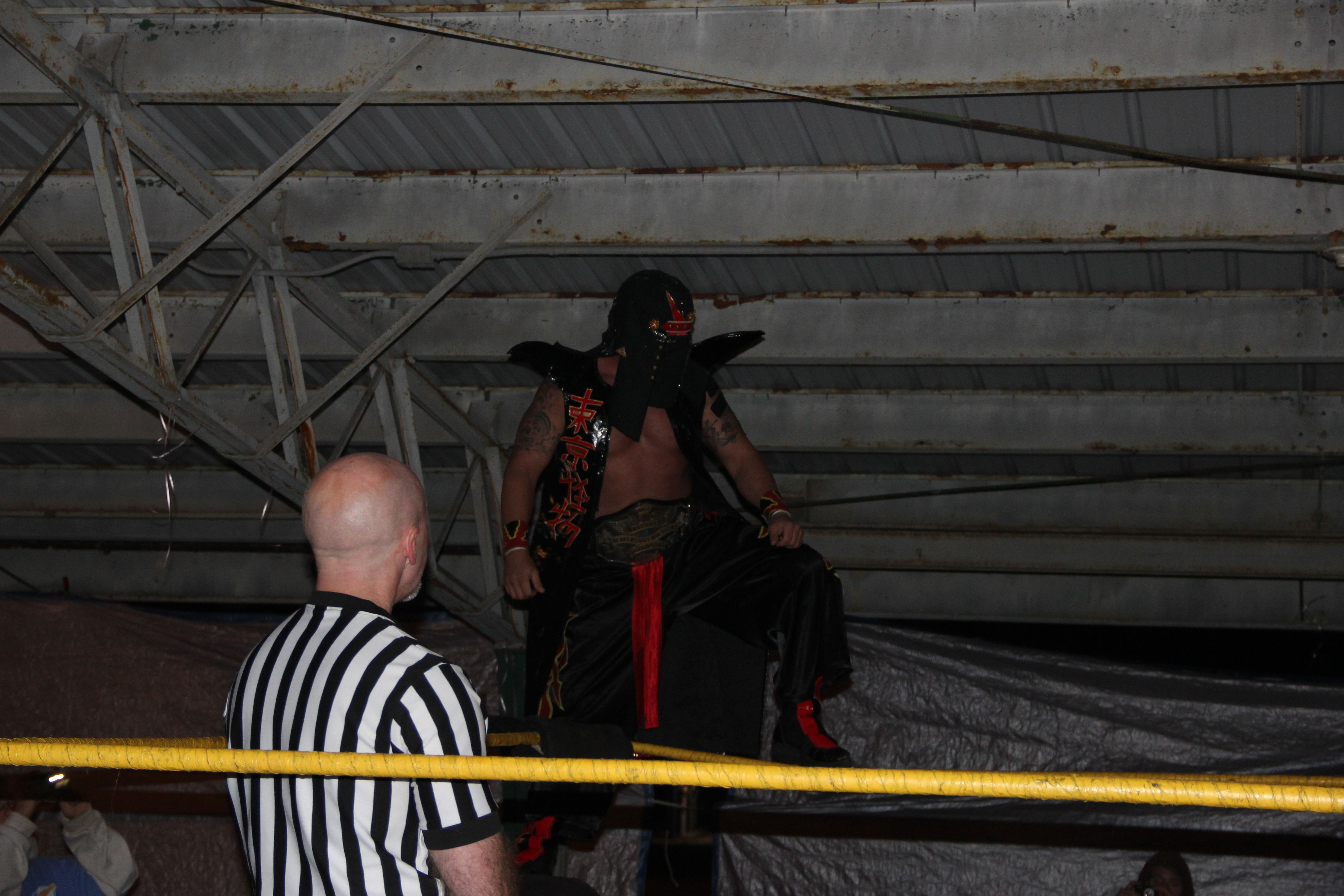 kahagas